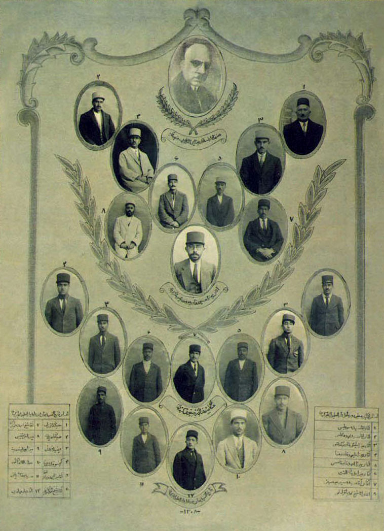 در بالای تابلو زیرنویس عکس : حضرت اشرف آقای میرزا یحیی خان قره گزلو وزیر معارف و زیر نویس عکس وسط تابلو : آقای میرزا حسین خان جودت رئیس معارف کرمان